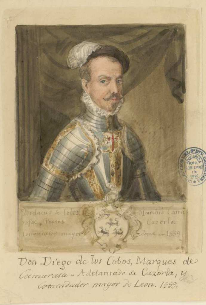 Diego de los Cobos, dibujo conservado en la Biblioteca Nacional, atribuido a Valentín Carderera. Inscripción: "Didacus de Cobos Marchio Cama / rasae, Prases Cazorla / Comendator mayor Leon ano 1559". Fuera del encuadre: Don Diego de los Cobos, Marqués de / Camarasa. Adelantado de Cazorla, y / Comendador Mayor de León, 1559